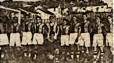 Formación del Imperia en la estación 1929-1930 campeones de la Serie B.